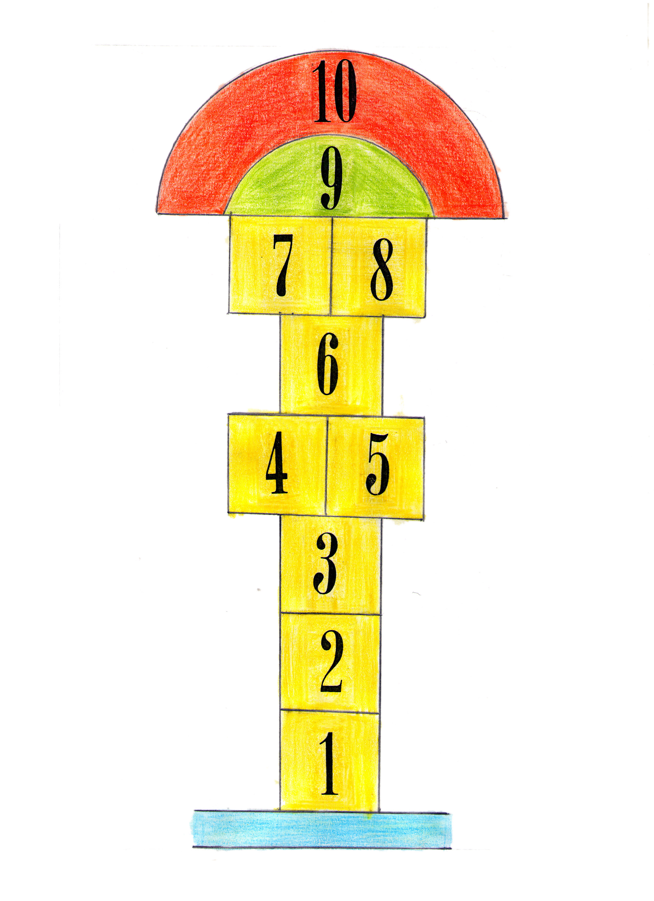 "Xıy xıy" — Azərbaycanda ən çox yazqabağı (bayramqabağı) günlərdə, eləcə də digər mövsümlərdə uşaq və gənclər arasında, xüsusən də qızlar arasında geniş şəkildə oynanılan qədim oyunlarından biridir.